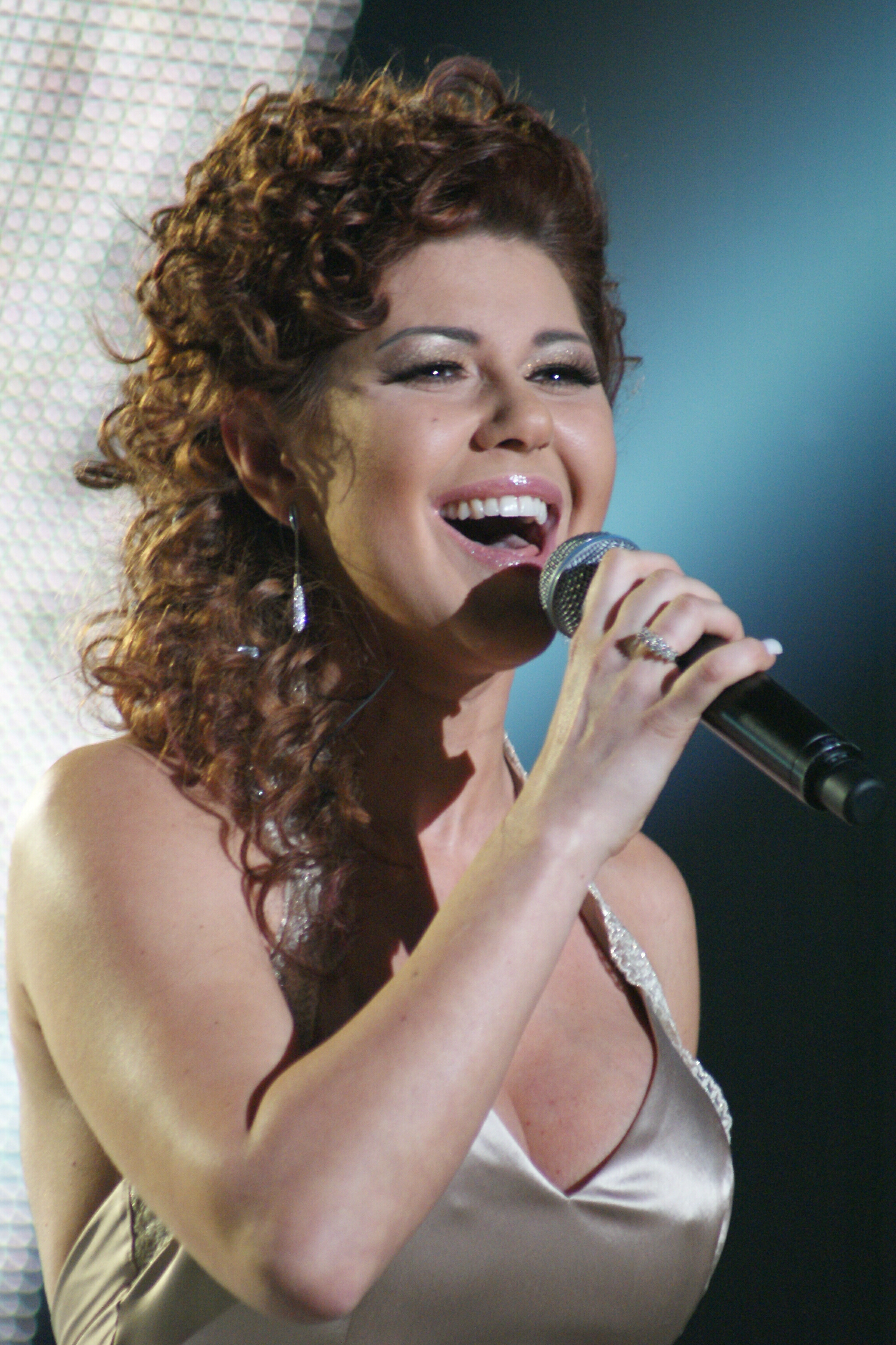 Iwona Węgrowska podczas Krajowych Eliminacji do Konkursu Piosenki Eurowizji, 14 lutego 2010